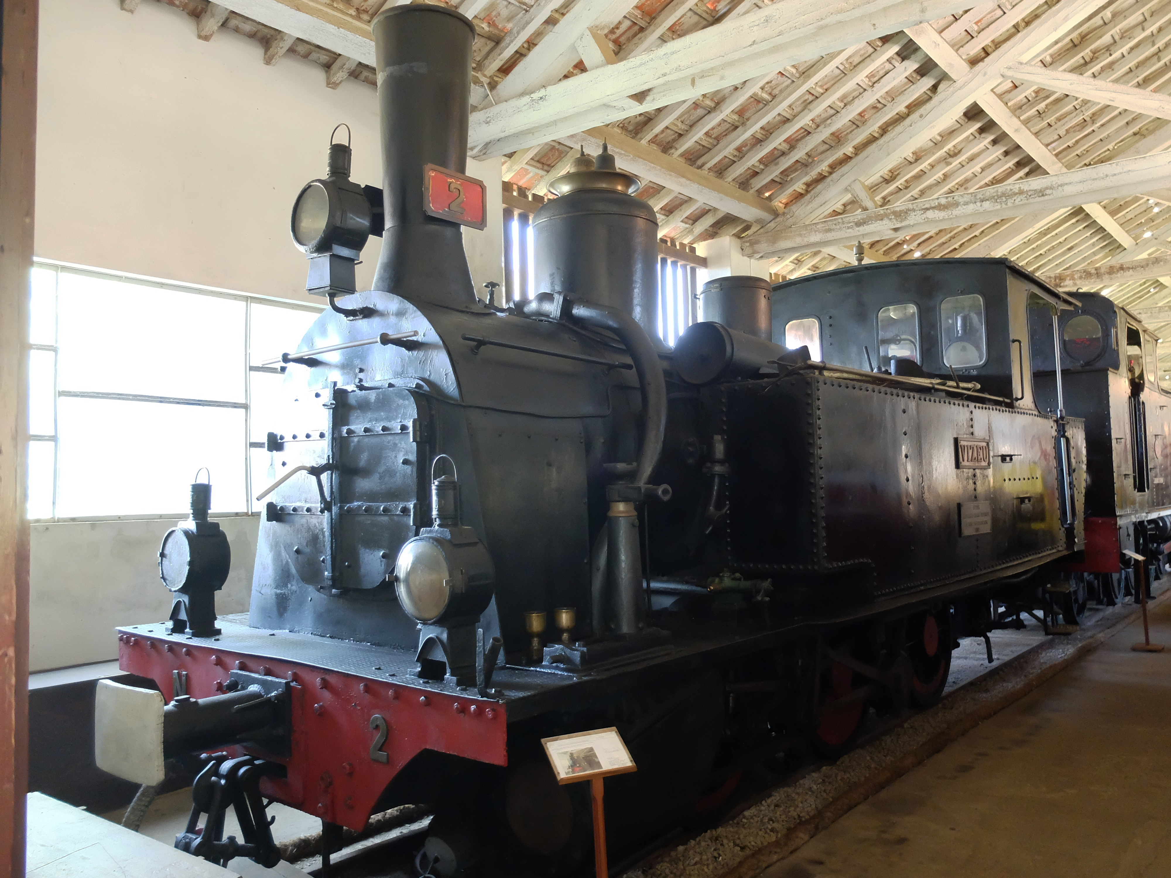 CN 2 der Linha do Dão im Museum Macinhata